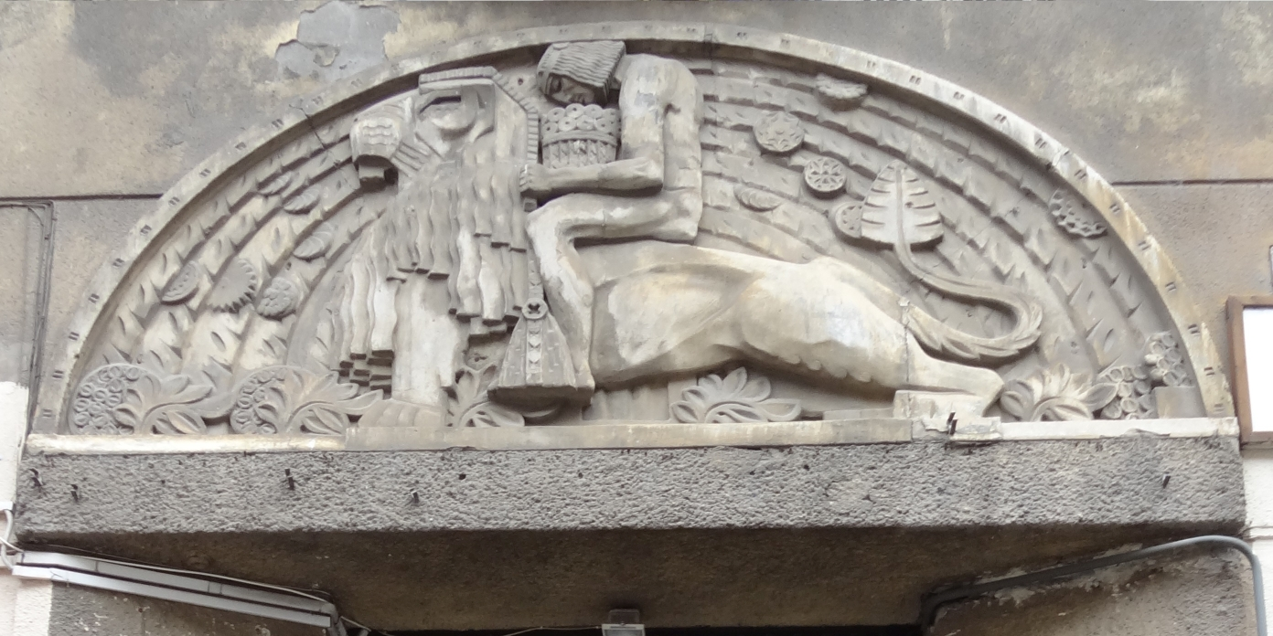 Budapest, Népszínház utca 37. – Ornamentika bejárat fölött 2017